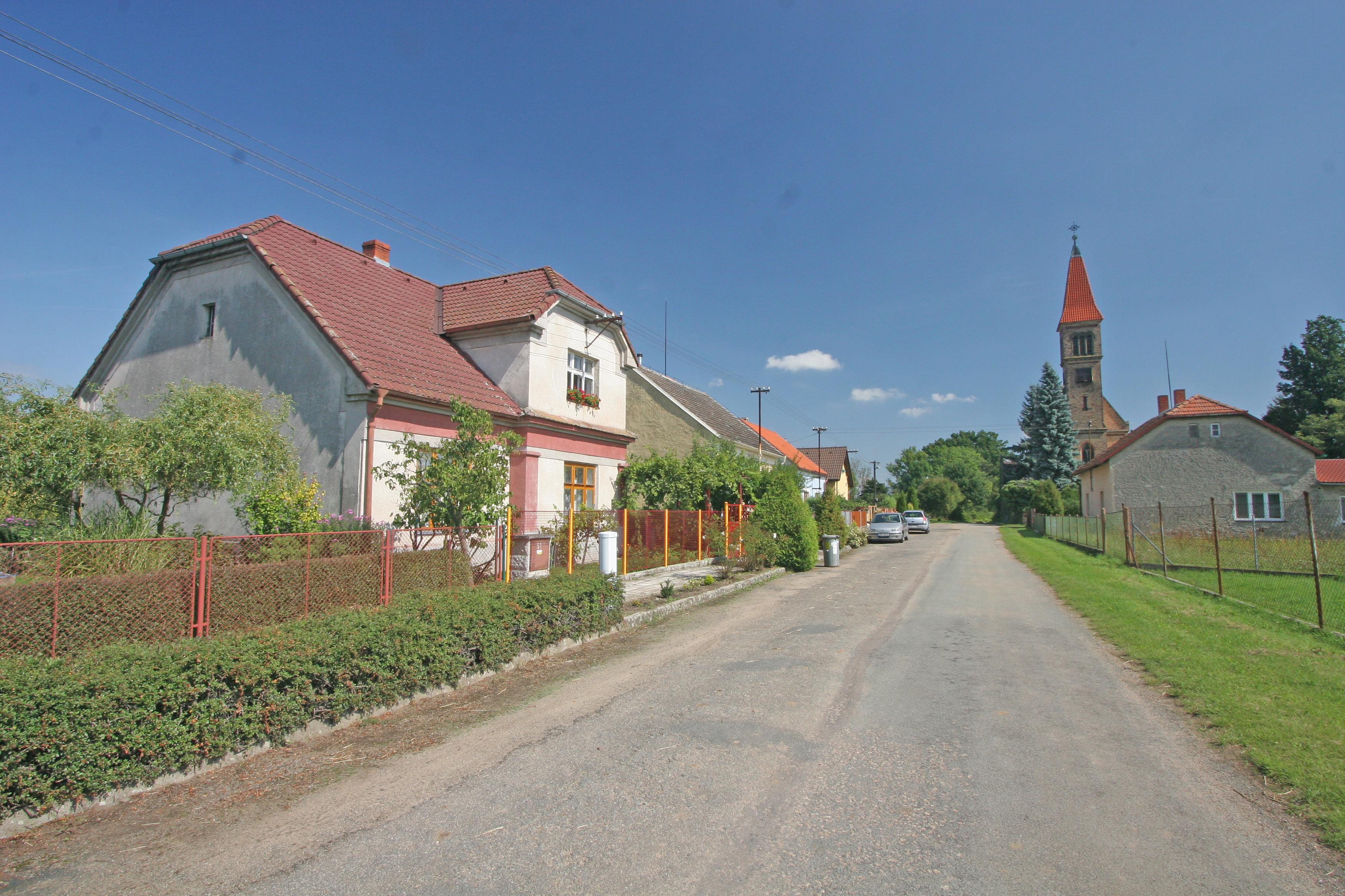 Selmice čp. 51